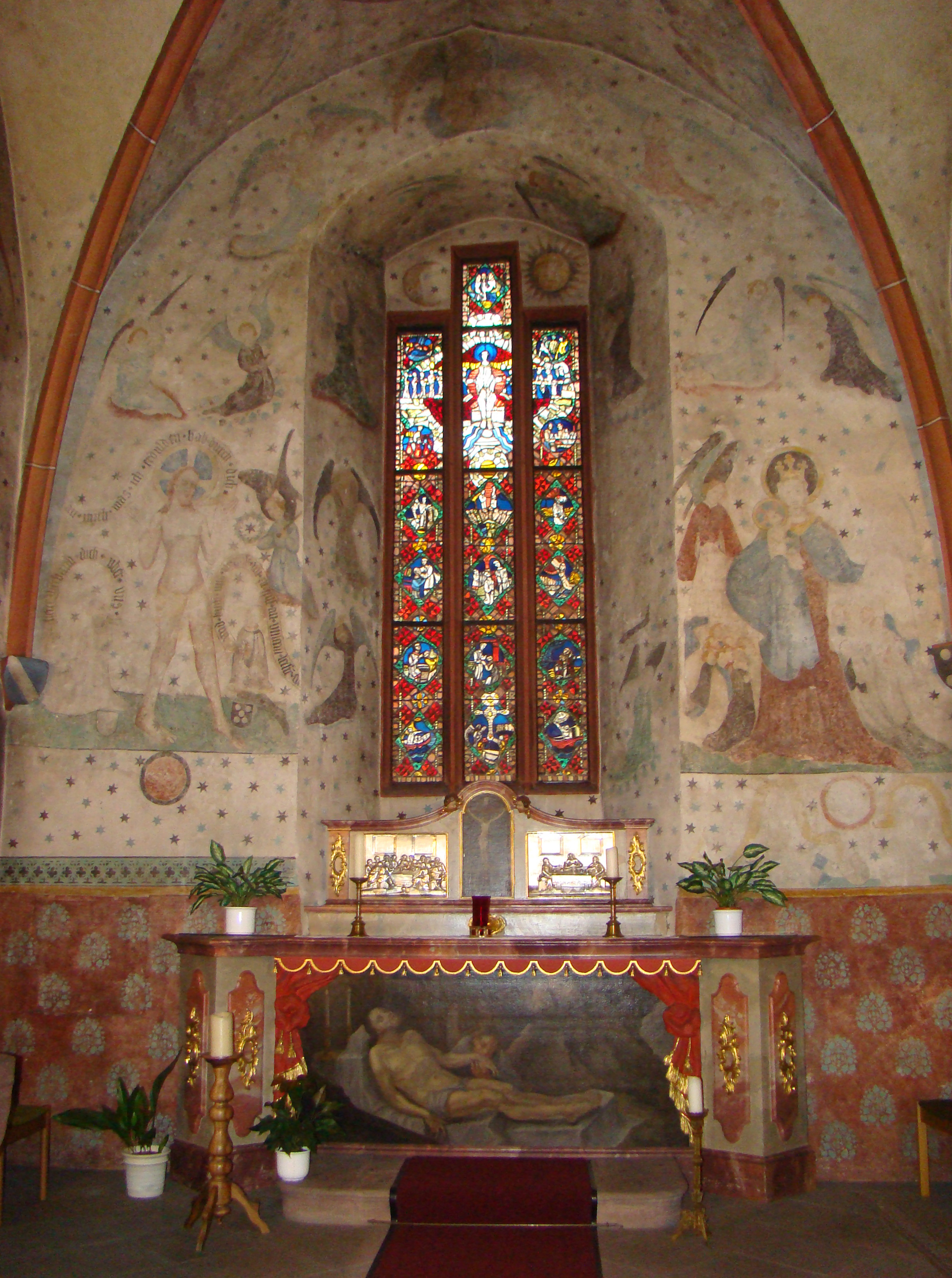 Pankratiuskapelle Altwiesloch: Chor